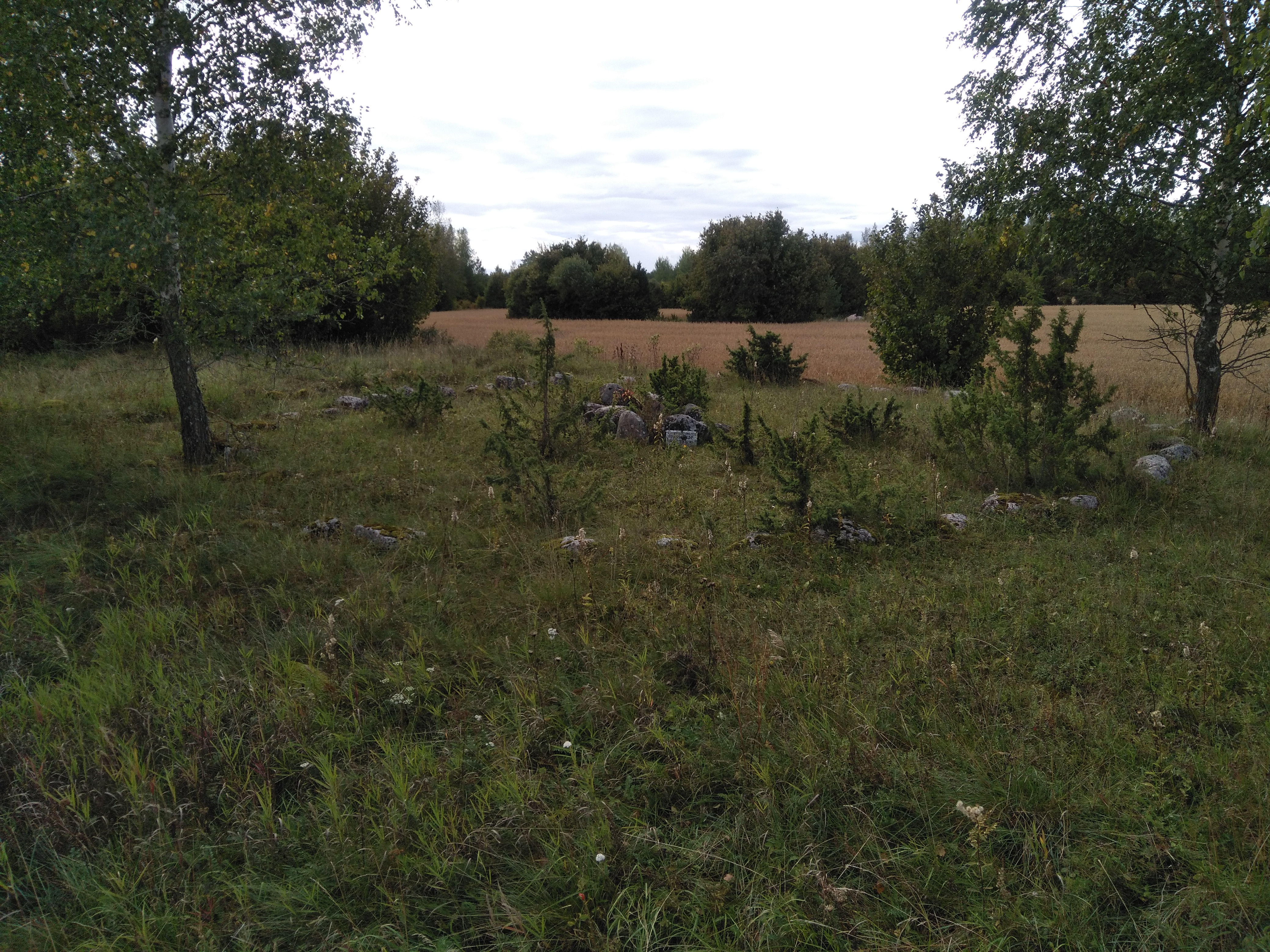 Pronksiaegne matusekoht.